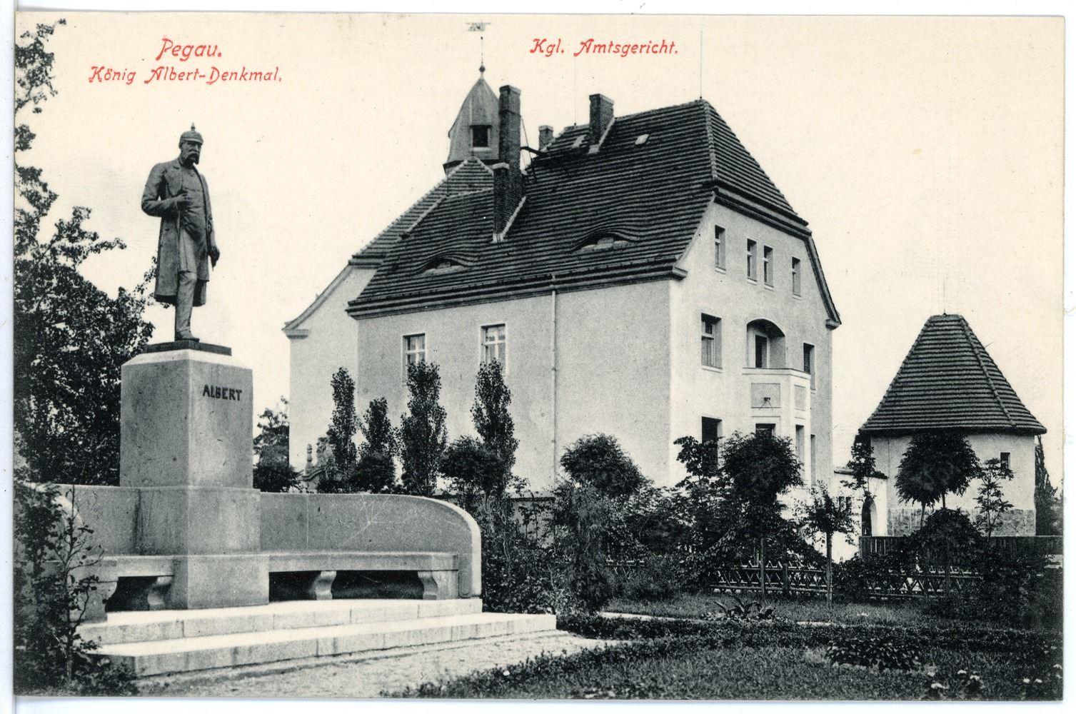 Pegau; König Albert Denkmal und Amtsgericht This postcard is from publisher Brück & Sohn in Meißen ( postcard has a unique number 16355 and is available in a higher resolution at the publisher. This images was uploaded in a cooperation project between Wikipedians and the publisher.